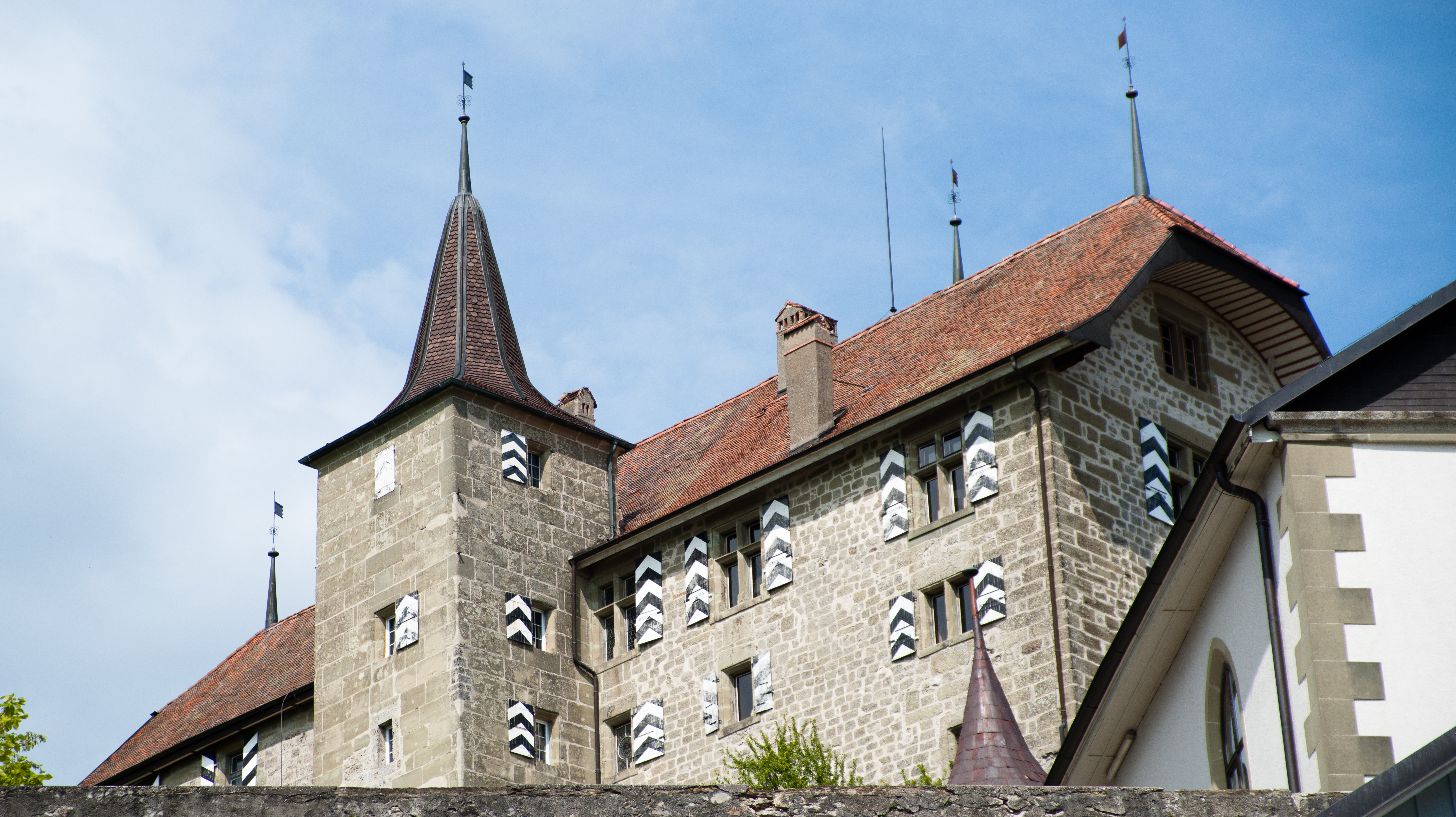 Château de Rue